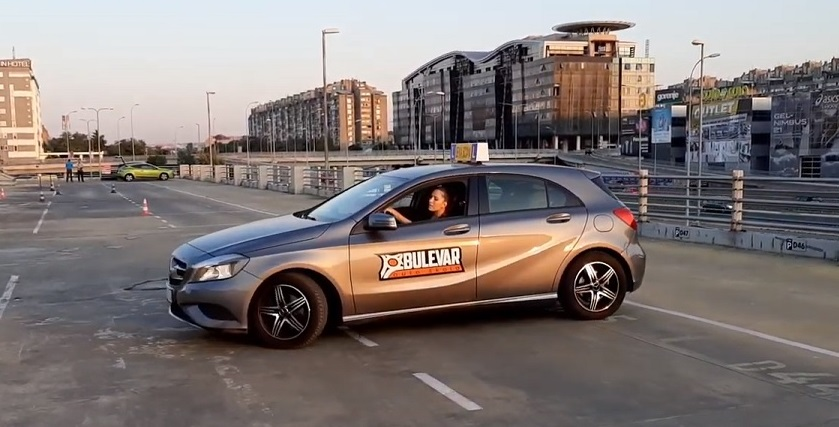 Izvođenje radnje "polukružno okretanje"